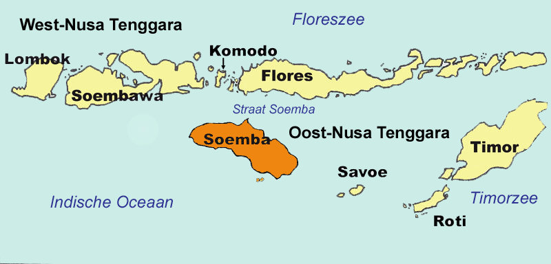 Eigen gemaakte kaart